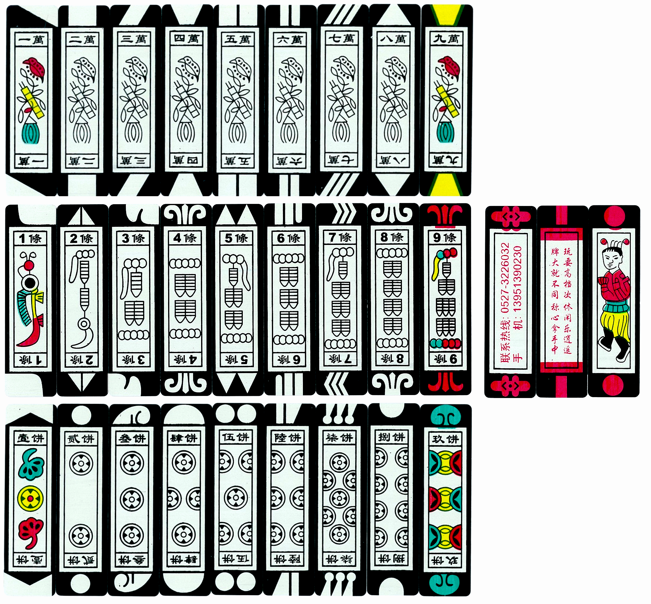 中文（台灣）: 沭陽地方紙牌